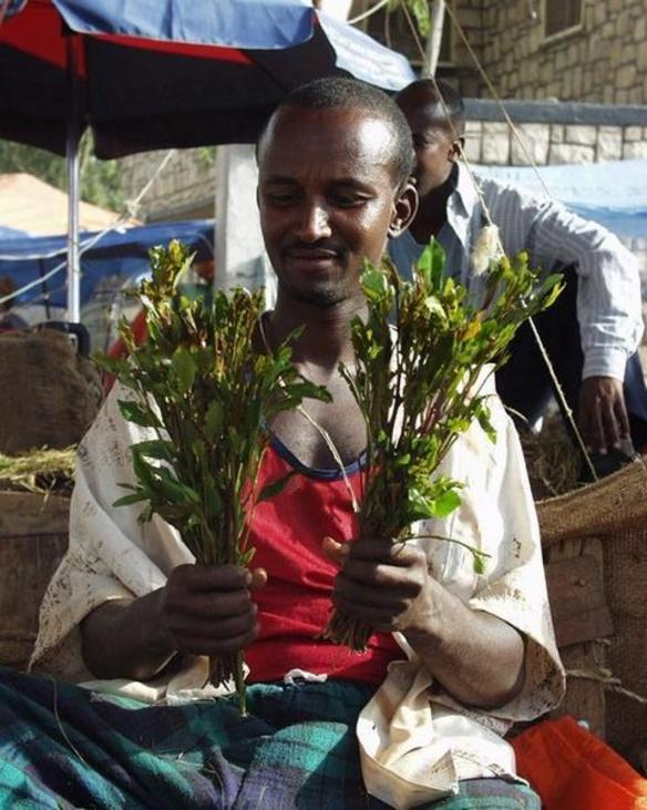 Qat seller in Burao, Somaliland/Somalia